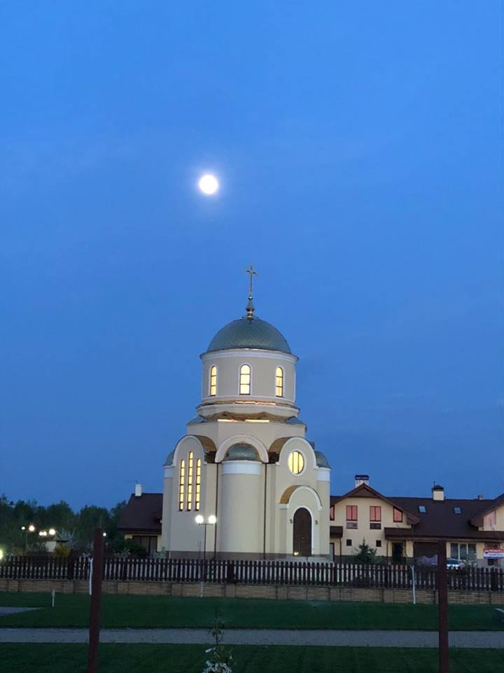 Вечірня служба у храмі Святих мучениць Віри, Надії, Любові та їхньої матері Софії; УГКЦ